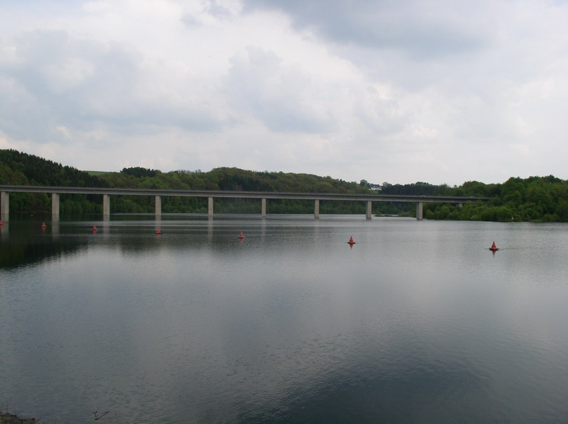 Die Brücke der Bundesstraße 229 über die Wuppertalsperre